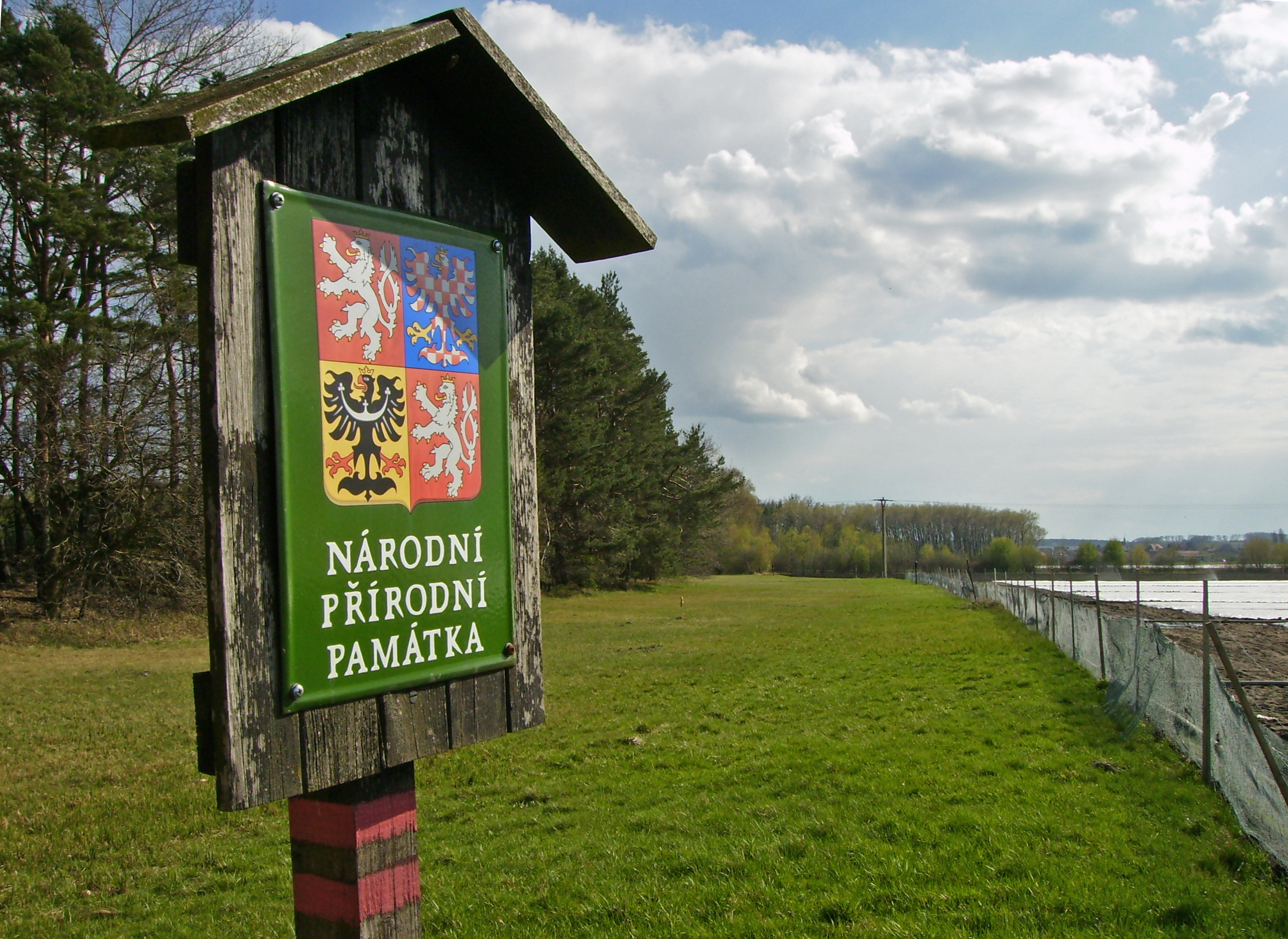 Národní přírodní památka Slatinná louka u Velenky, Hradištko, okres Nymburk